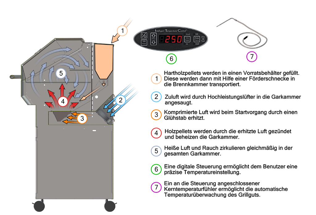 Aufbau und Funktionsweise eines Pelletgrills bzw. Pelletsmokers